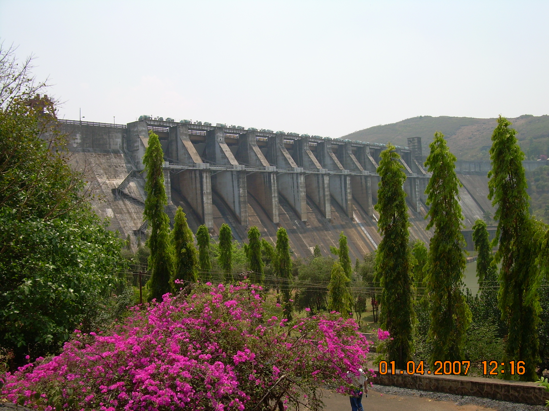 Kolab dam